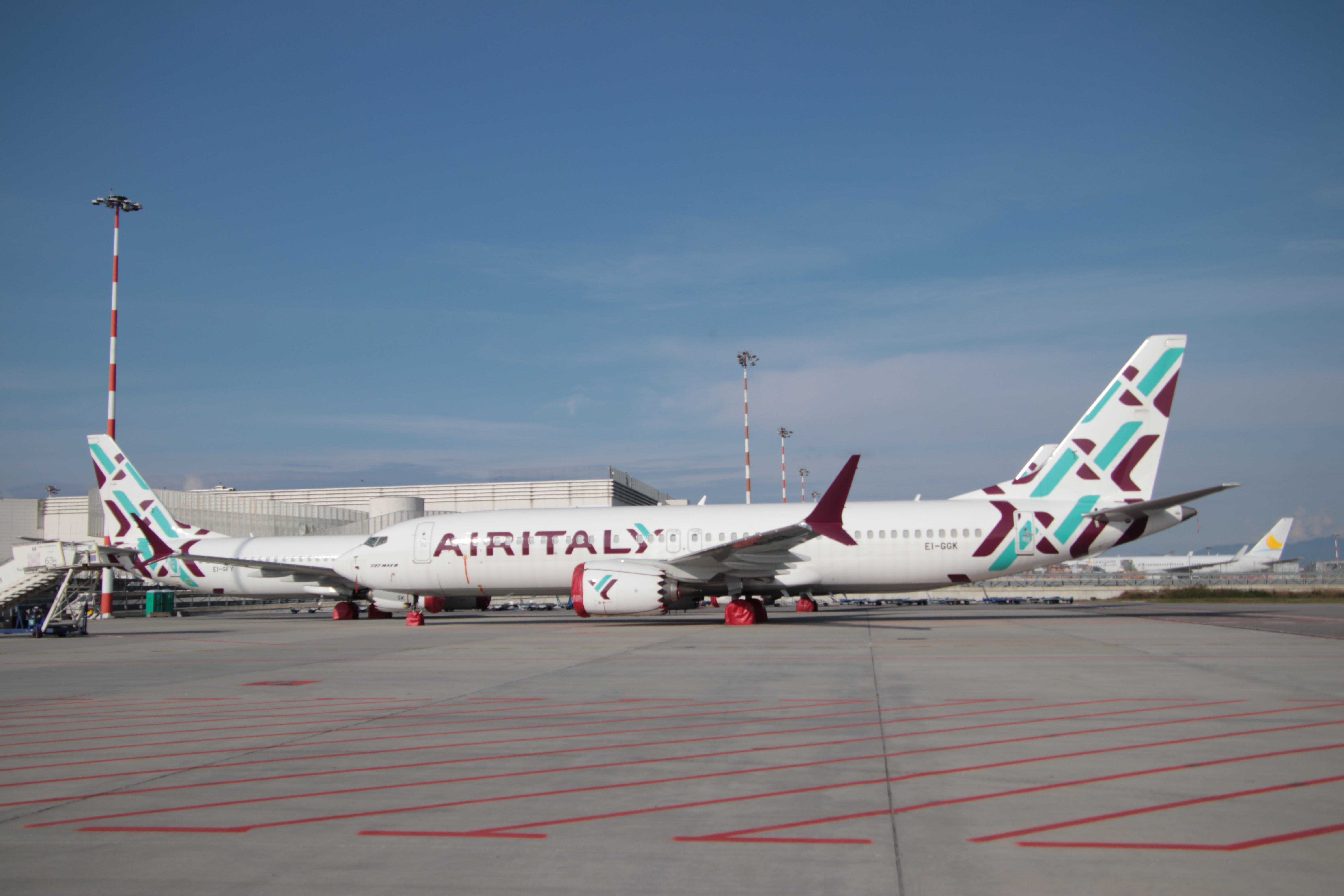 I tre B737 MAX 8 di Air Italy.